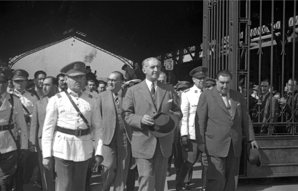 Juan Antonio Ríos es elegido Presidente de la República.